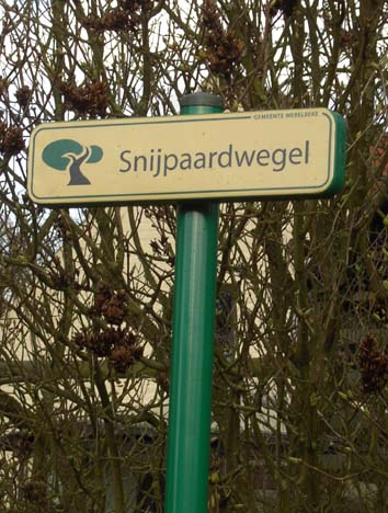 Trage Wegen - Snijpaardwegel nabij Bottelare - Merelbeke - Oost-Vlaanderen - Vlaanderen - België